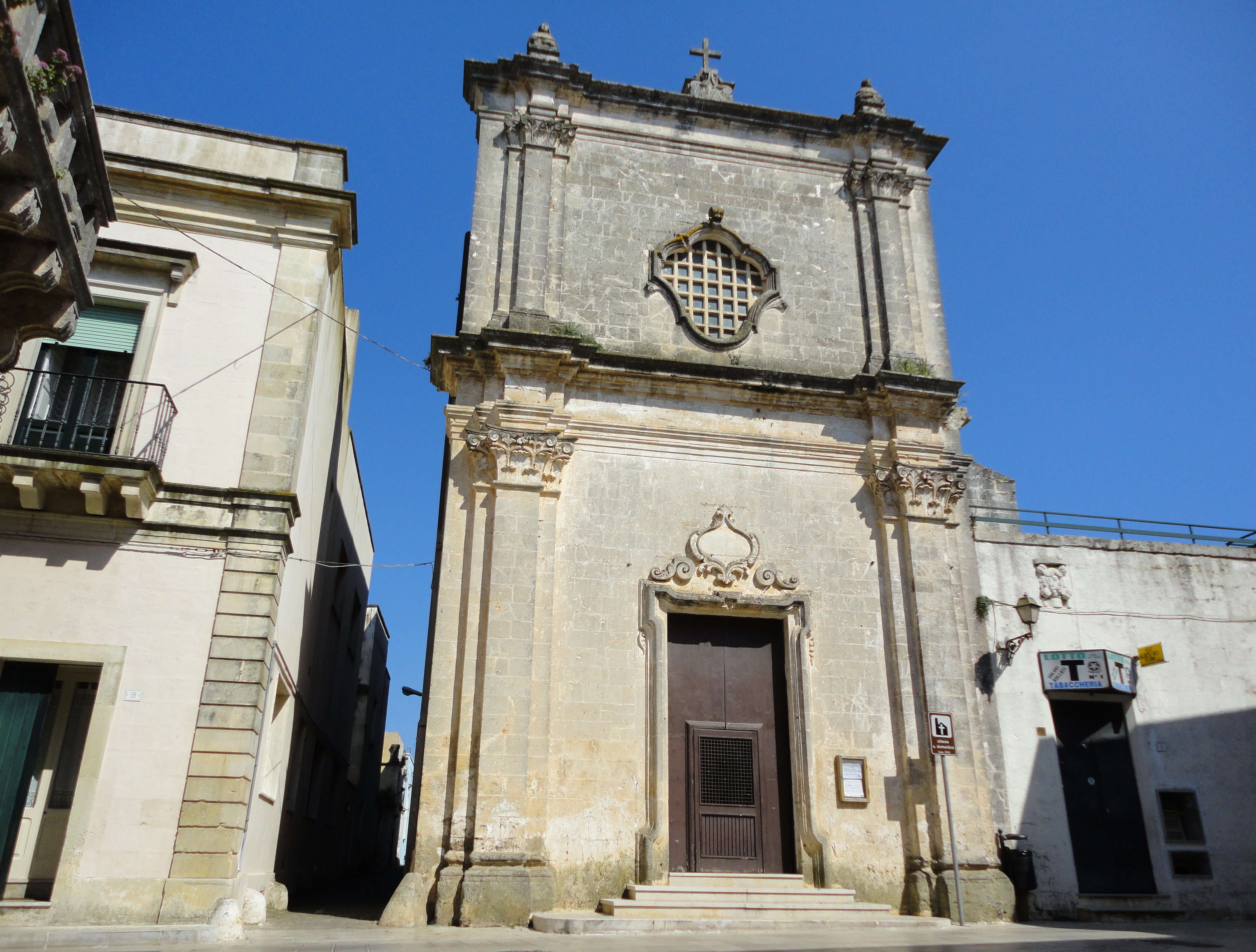 Chiesa dei Domenicani di Andrano